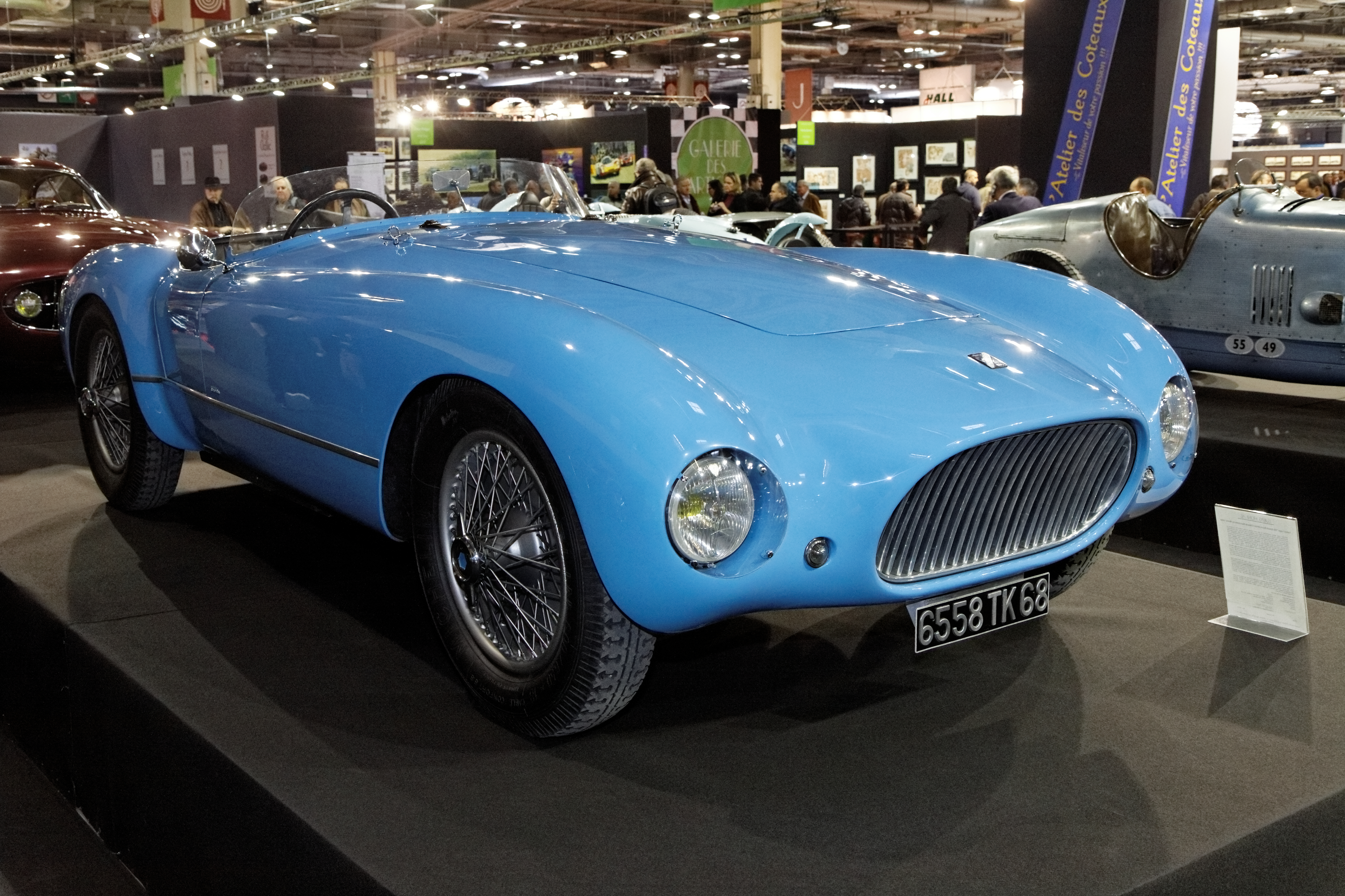 1950 Talbot Lago T26 Grand Sport short chassis barchetta body by Carozzeria Motto of Turin